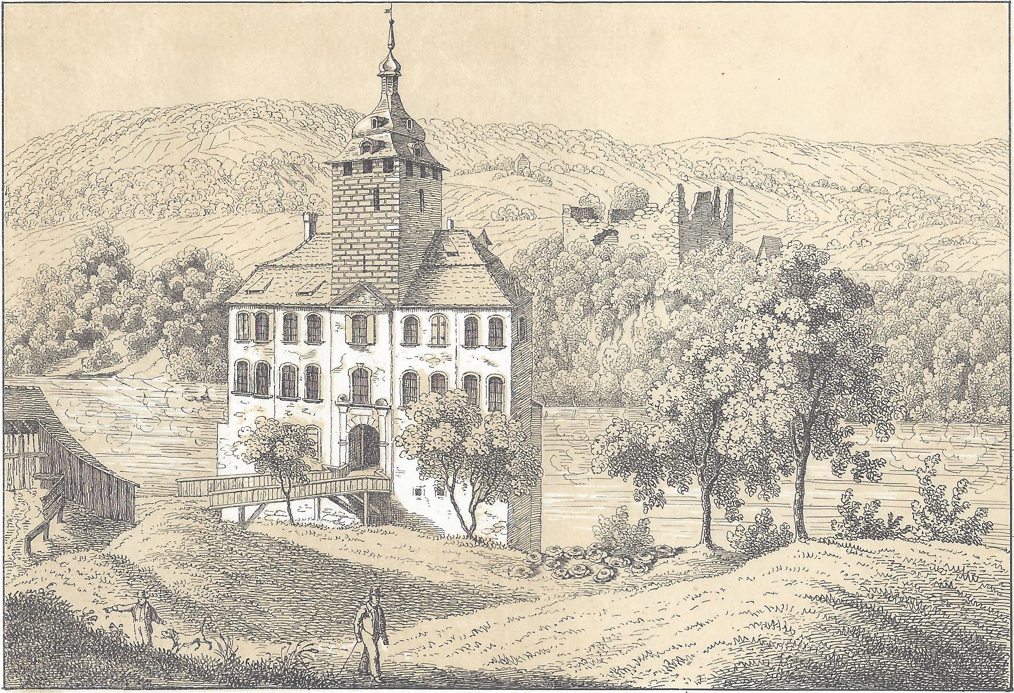 Federlithografie mit Tonplatte: Darstellung des 1875 abgegangenen Schlosses Schwarzwasserstelz im Aargau von Johann Friedrich Wagner (Verlag der lithograf. Anstalt von J. F. Wagner, Bern, 1840)